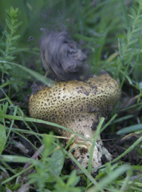 Vescia che esplode liberando le spore